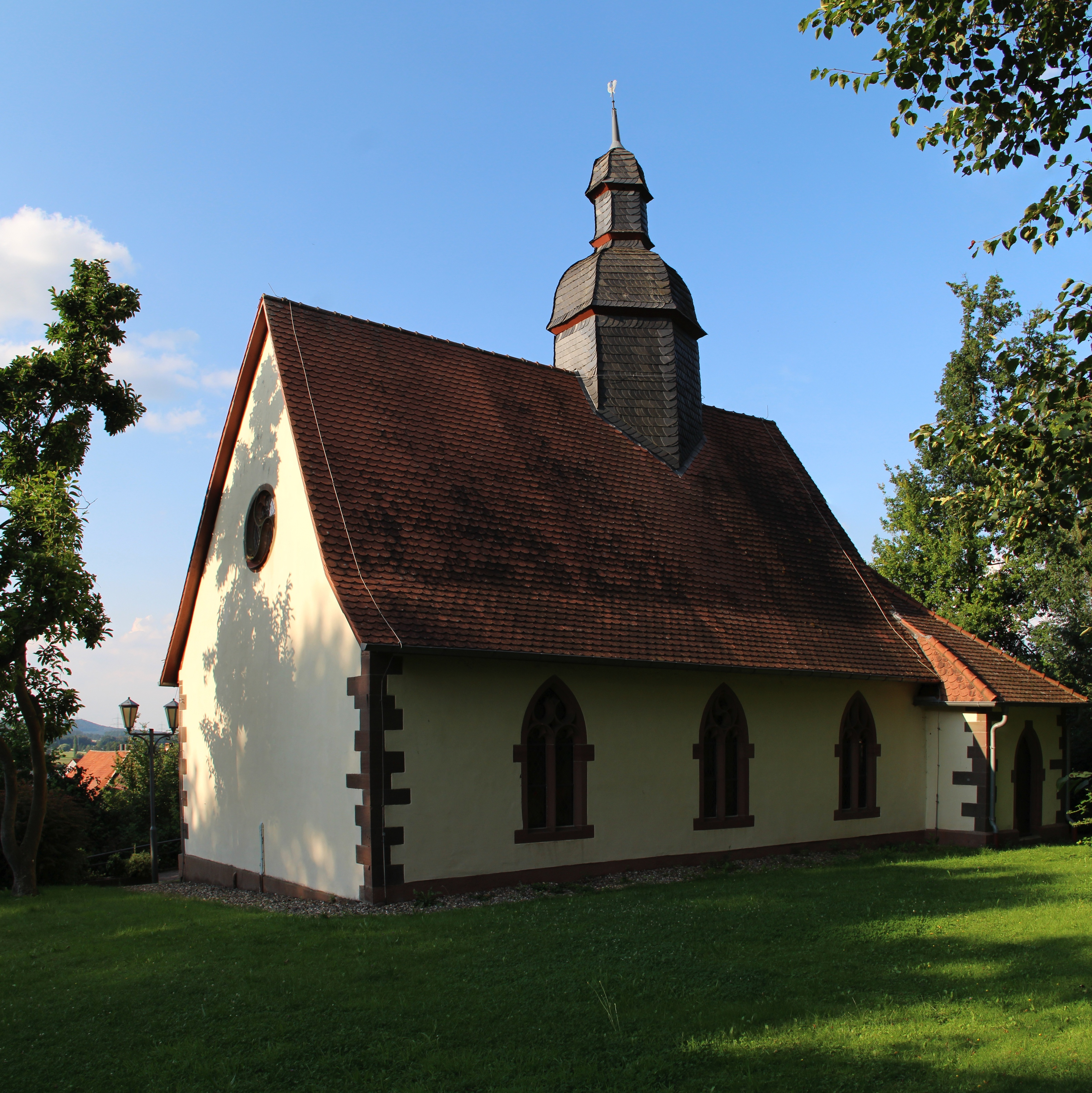 Kirche Ascherode - Ansicht von Südwest